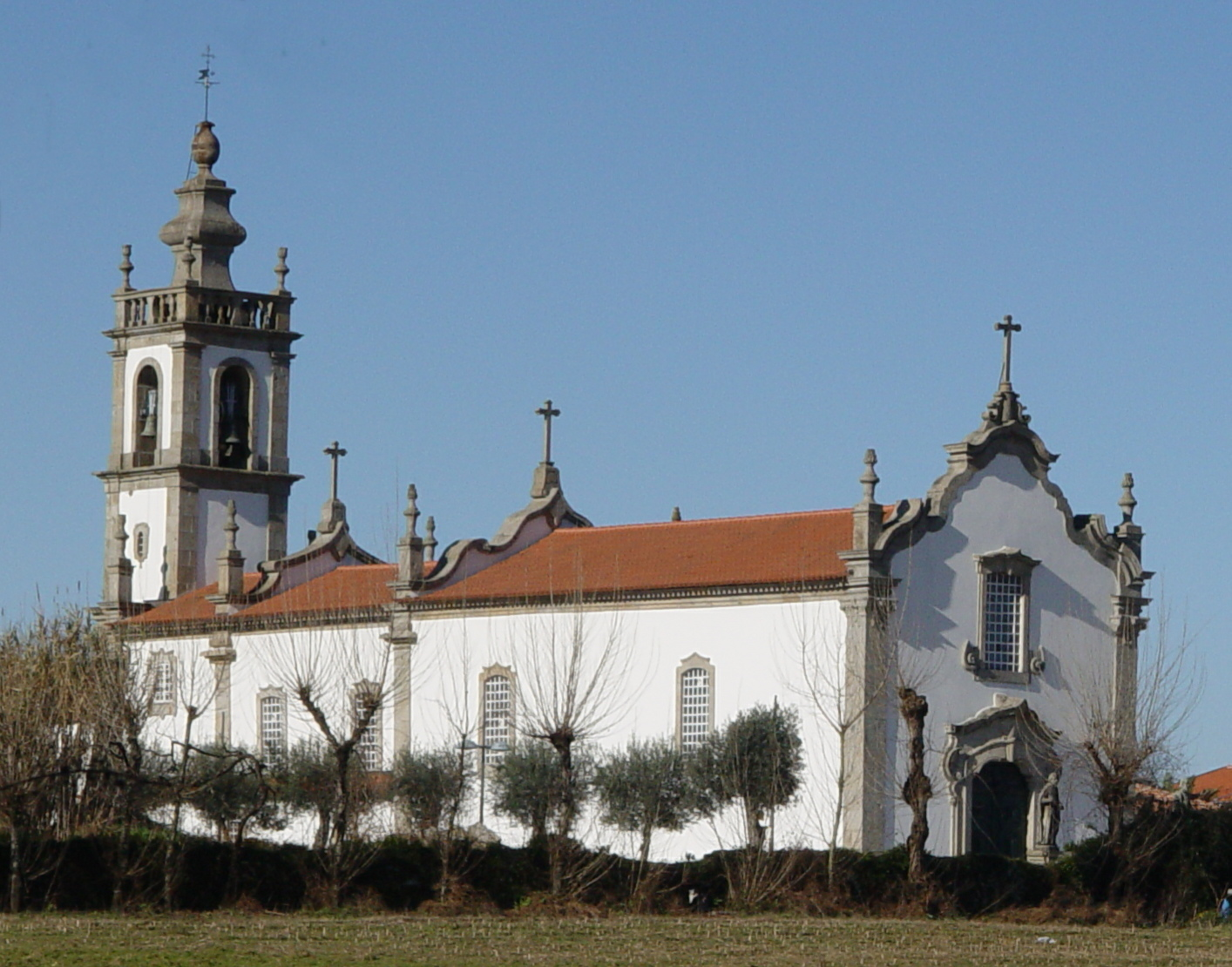 Soutelo Church in Vila Verde Portugal